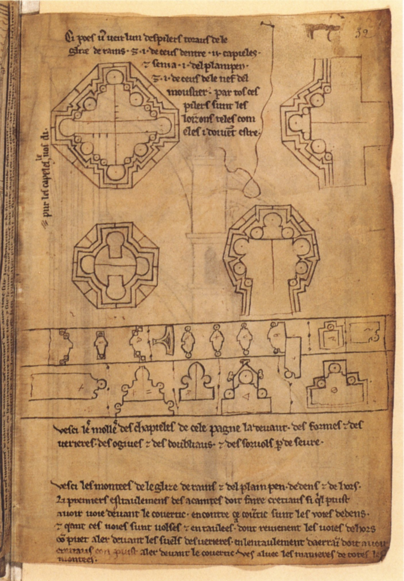 Stránka z Hutní knihy Villarda de Honnecourt